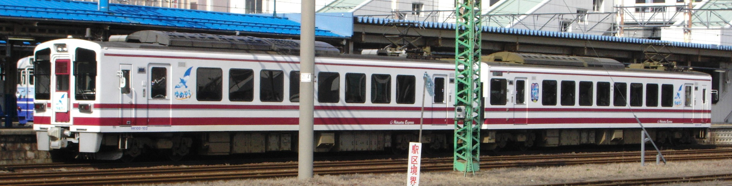 北越急行HK100形電車